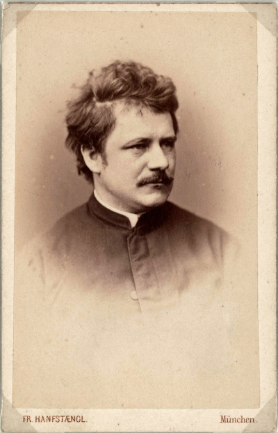 Der Maler Gabriel von Max, (1840-1915) undat., unsign., bez. u. l. und u. r., Albuminpapierkopie, Carte de Visite, 93 x 58 mm (Platte), 101 x 65 mm (Blatt), Staatliche Graphische Sammlung München, Inv.-Nr. 258820 D